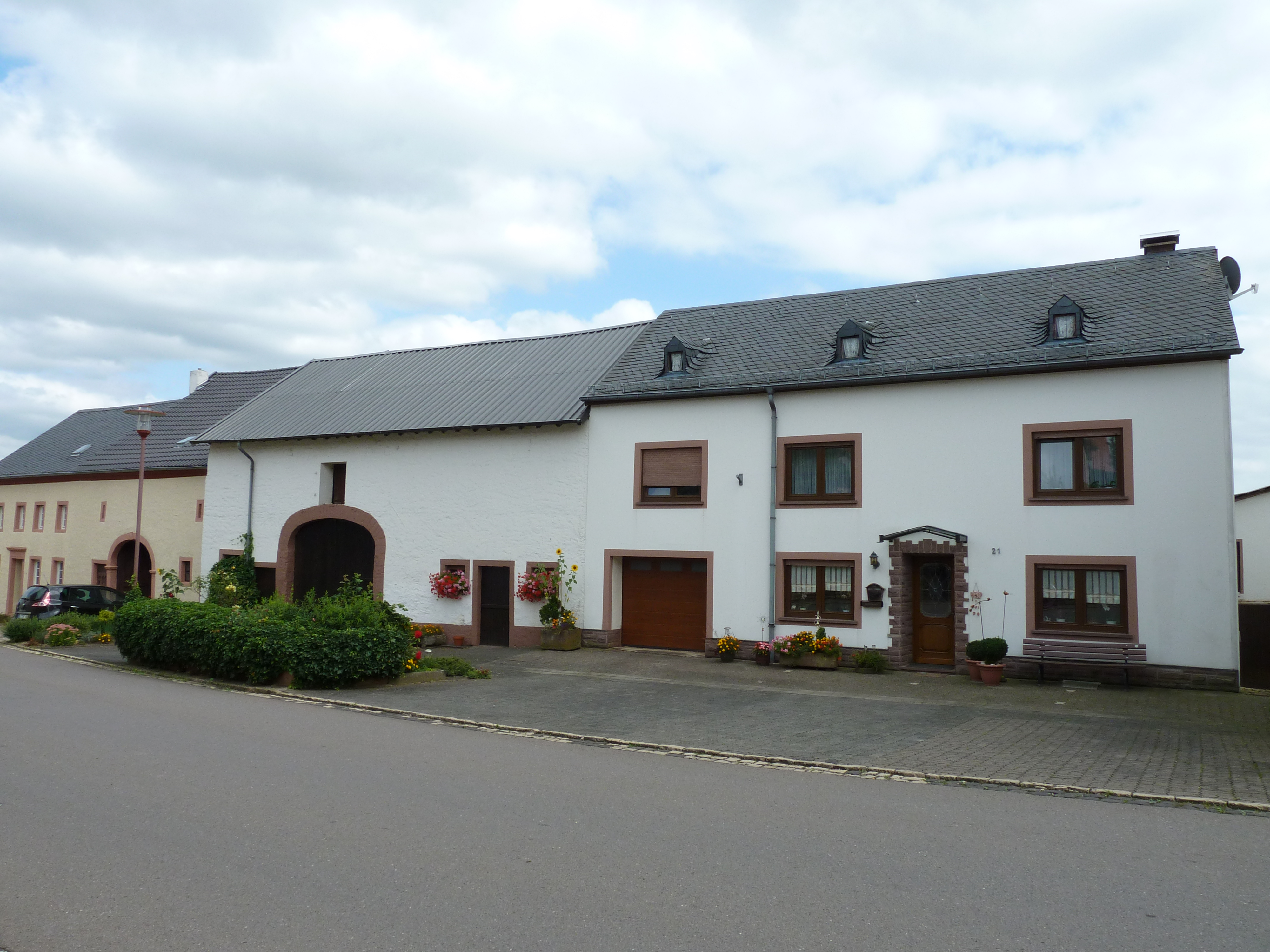 Hauptstraße 21 teil von Gruppe gut erhaltener Höfe auf der Ostseite der Hauptstraße im Gindorf aus dem 18. und 19. Jahrhundert.